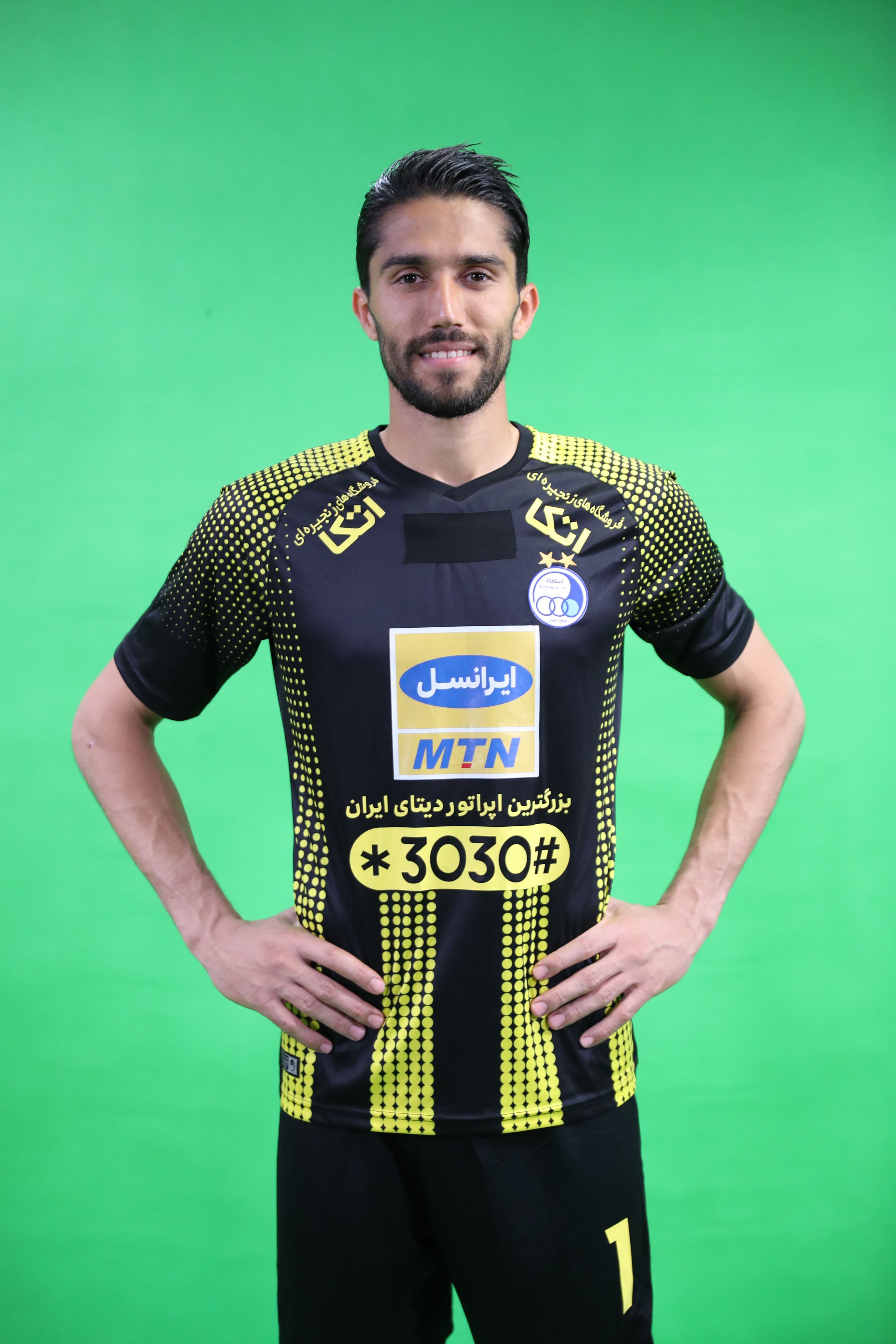 دروازه بان استقلال تهران